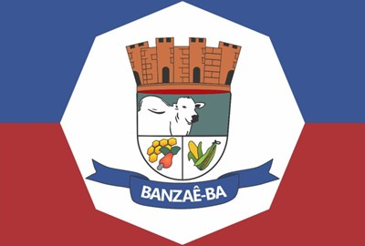 Bandeira de Banzaê/BA